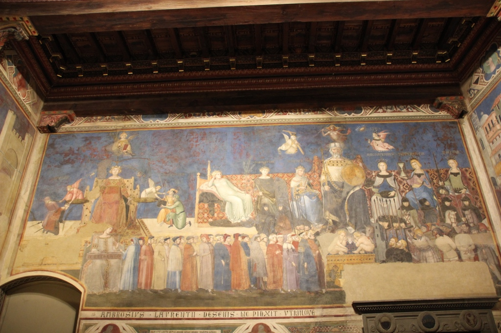 Siena_Palazzo Pubblico